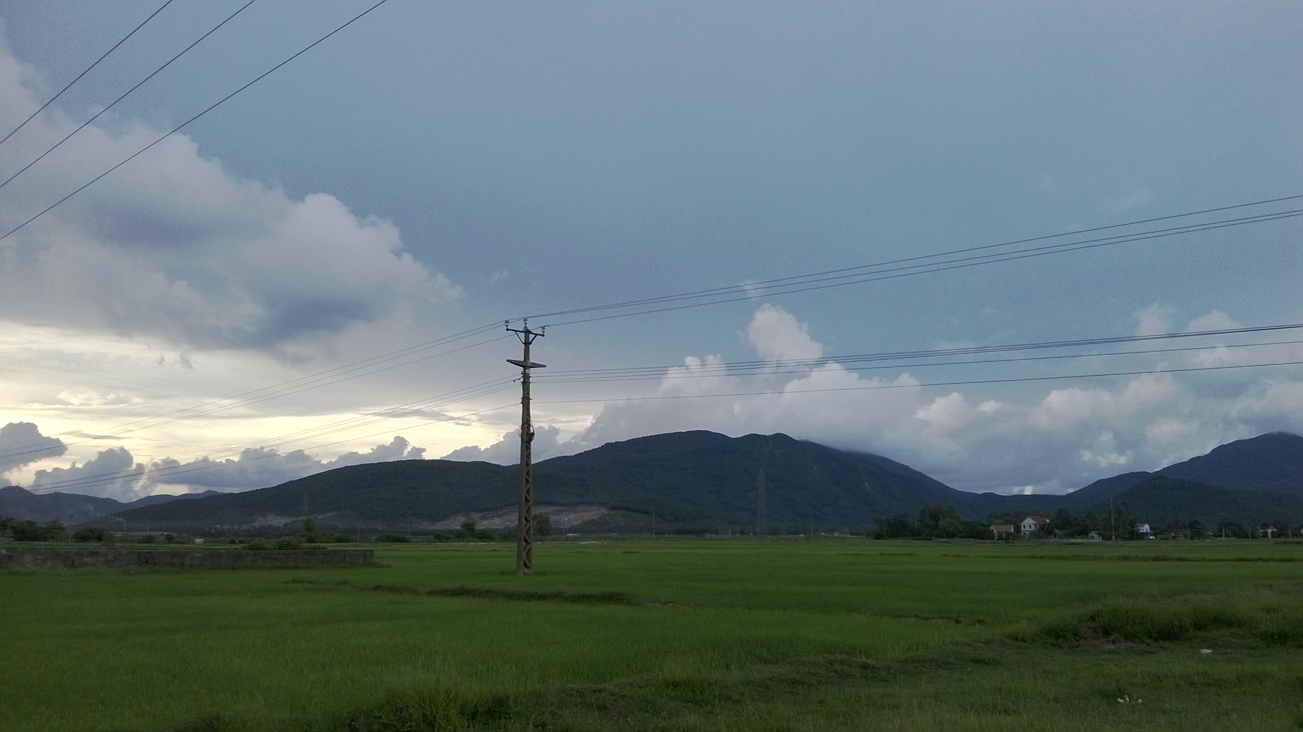 Núi Hồng Lĩnh, nhìn từ xã Vượng Lộc, huyện Can Lộc, tỉnh Hà Tĩnh